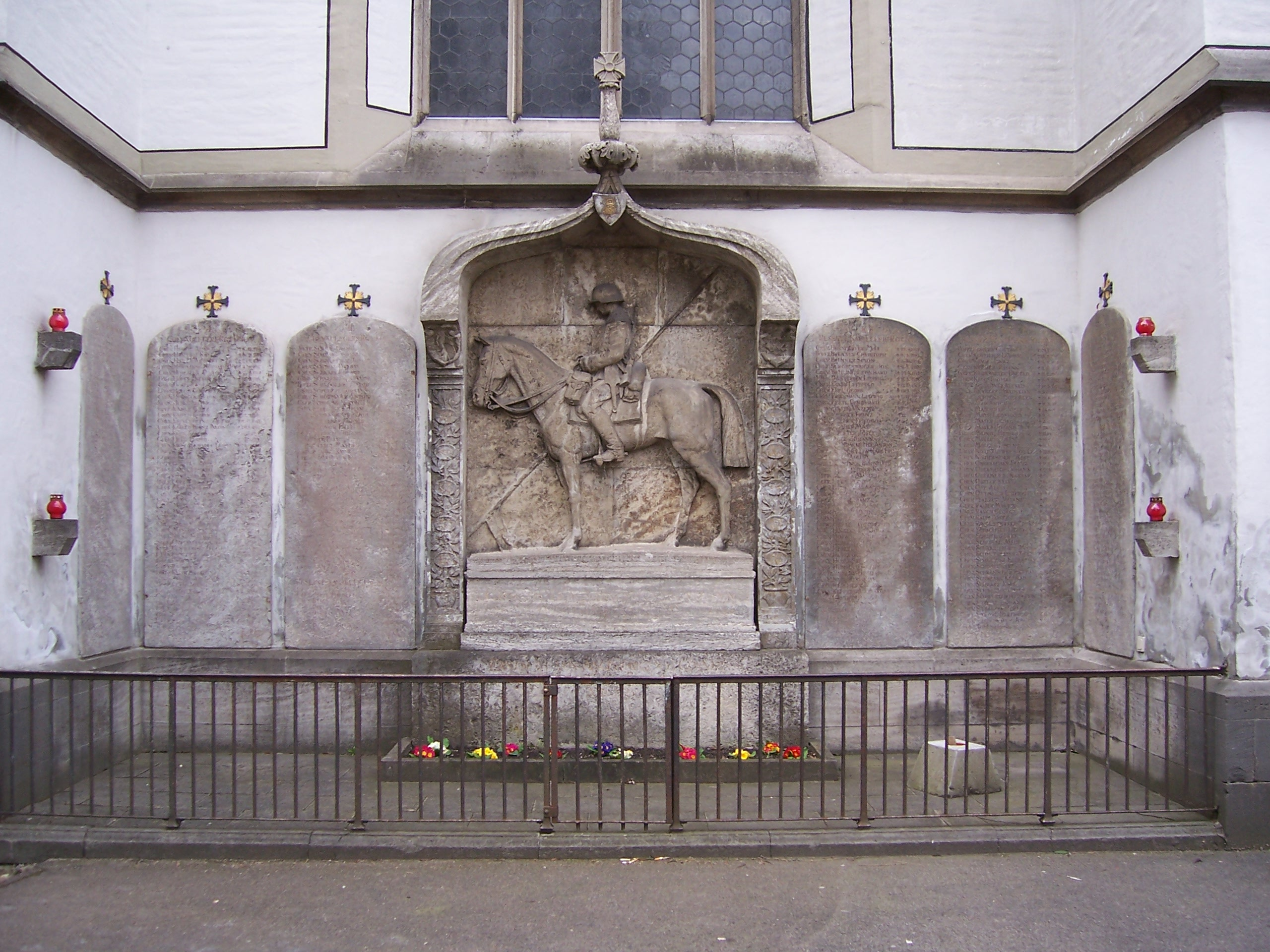 Chevauleger Denkmal an der Basilika St. Ulrich und Afra in Augsburg. Selbst aufgenommen am 22.4.2006.